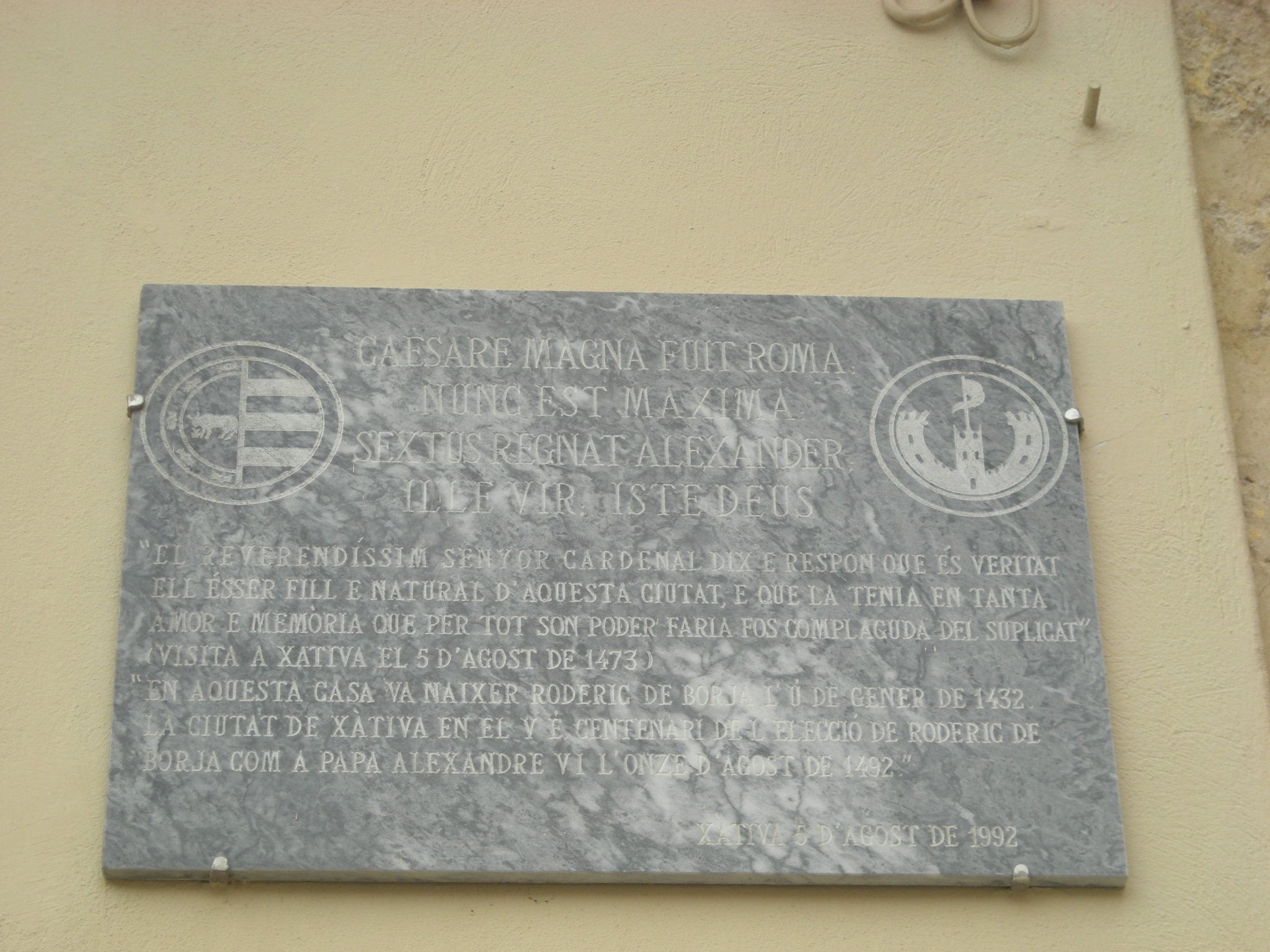 Placa situada a la casa natal de qui seria el Papa Alexandre VI. Diu: "CAESARE MAGNA FUIT ROMA NUNC EST MAXIMA SEXTUS REGNAT ALEXANDER ILLE VIR, ISTE DEUS. "El reverendíssim senyor cardenal dix e respon que és veritat ell ésser fill e natural d'aquesta ciutat, e que la tenia en tanta amor e memòria que per tot son poder faria fos complaguda del suplicat". (Visita a Xàtiva el 5 d'agost de 1473) "En aquesta casa va nàixer Roderic de Borja l'ú de gener de 1432. La ciutat de Xàtiva en el Vé centenari de l'elecció de Roderic de Borja com a Papa Alexandre VI l'onze d'agost de 1492." Xàtiva 5 d'agost de 1992." La traducció del text en llatí és: "Roma fou gran amb el César, però ara és grandíssima; regna Alexandre VI; aquell, un home; eixe, Déu."